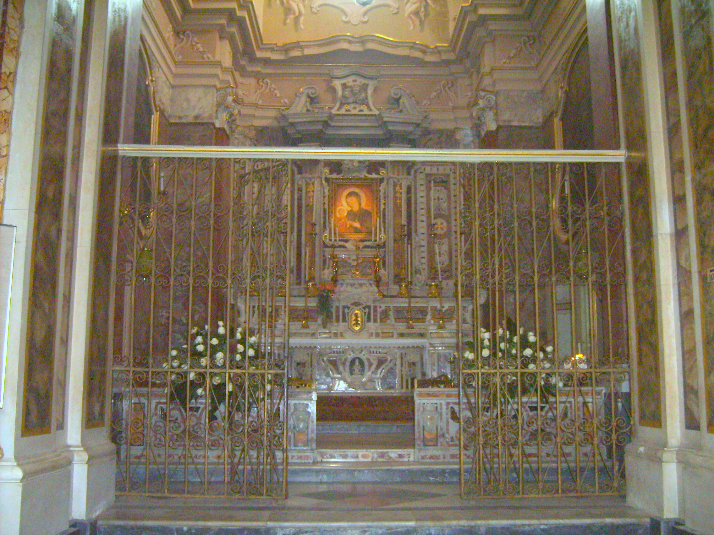 Cappellone della Madonna della Fontana nella chiesa matrice di Francavilla Fontana